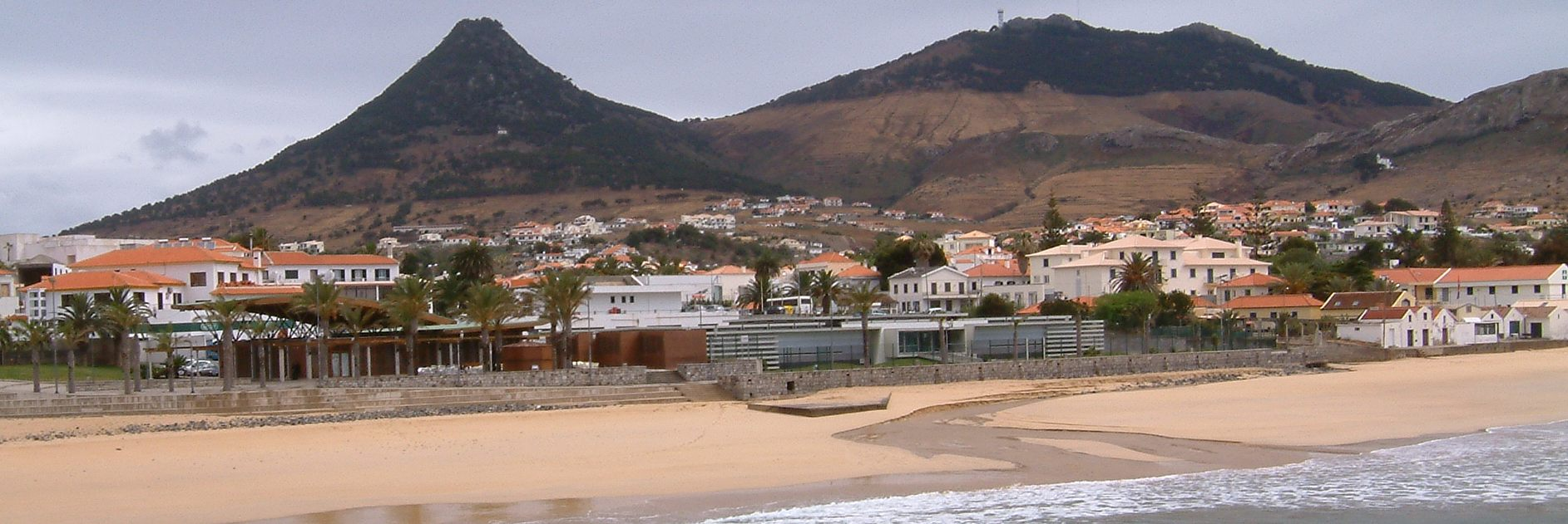 Madeira_Strand_porto_santo. Photograph: Peggy